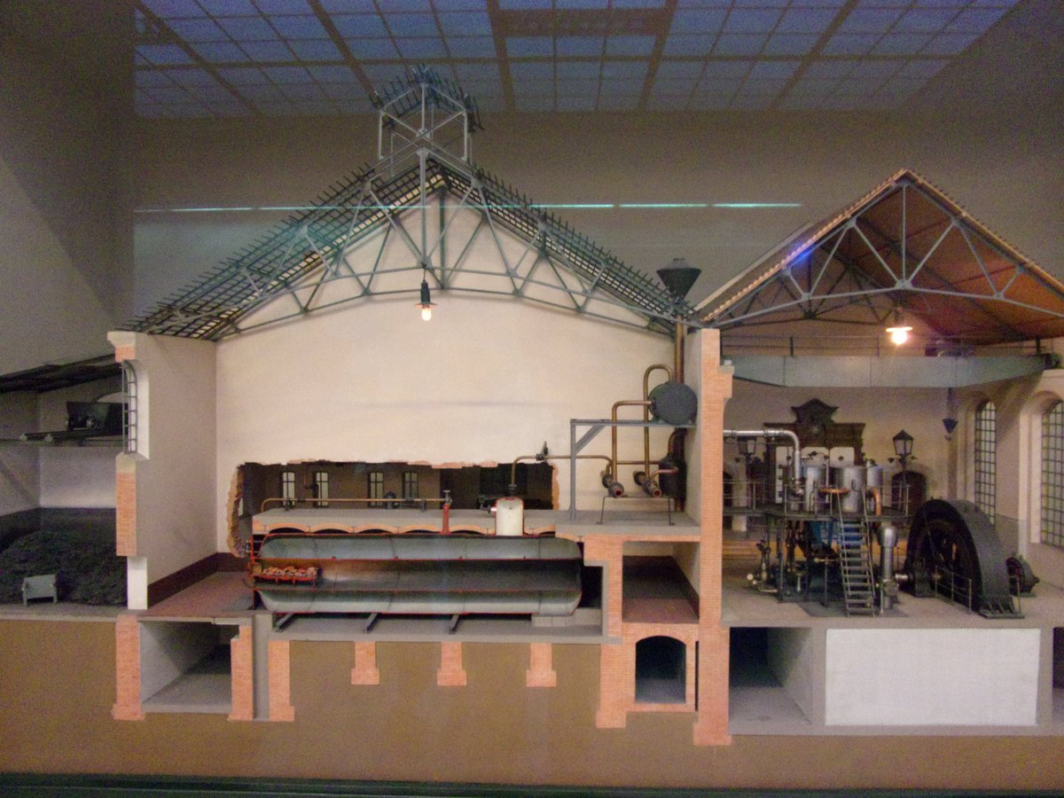 Modell des Kraftwerks Tullnau im Deutschen Museum